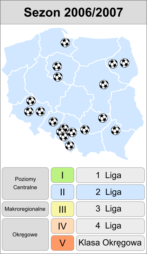 Jagiellonia Białystok w sezonie 2006/2007 -mapka